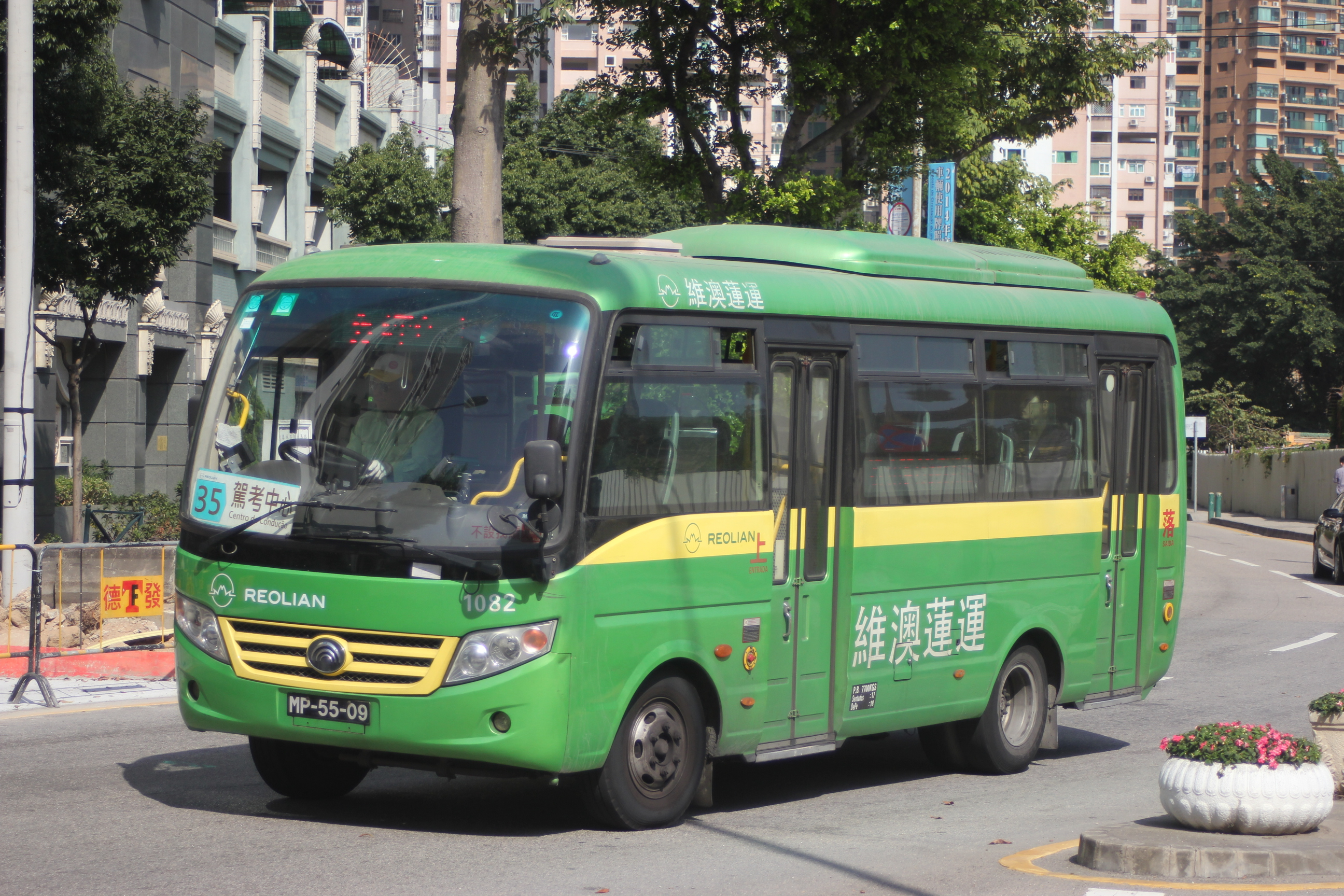 中文（台灣）: 維澳蓮運小巴1082行駛35路線